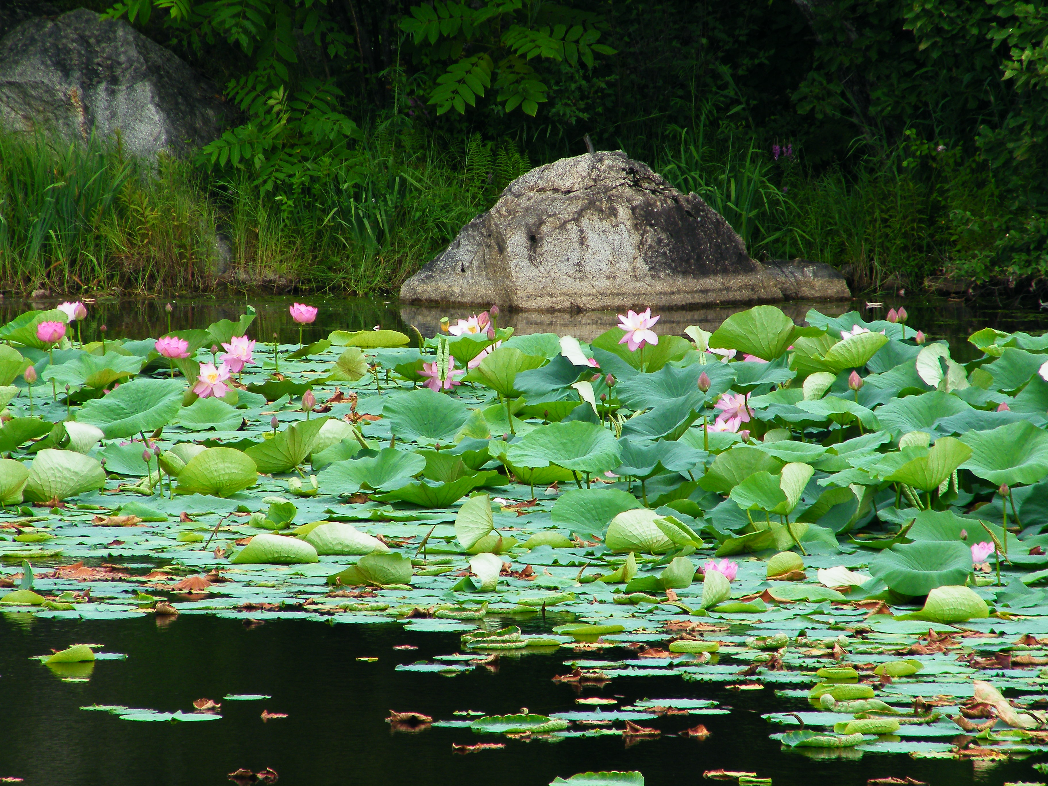 Озеро с лотосами возле поселка Горные Ключи